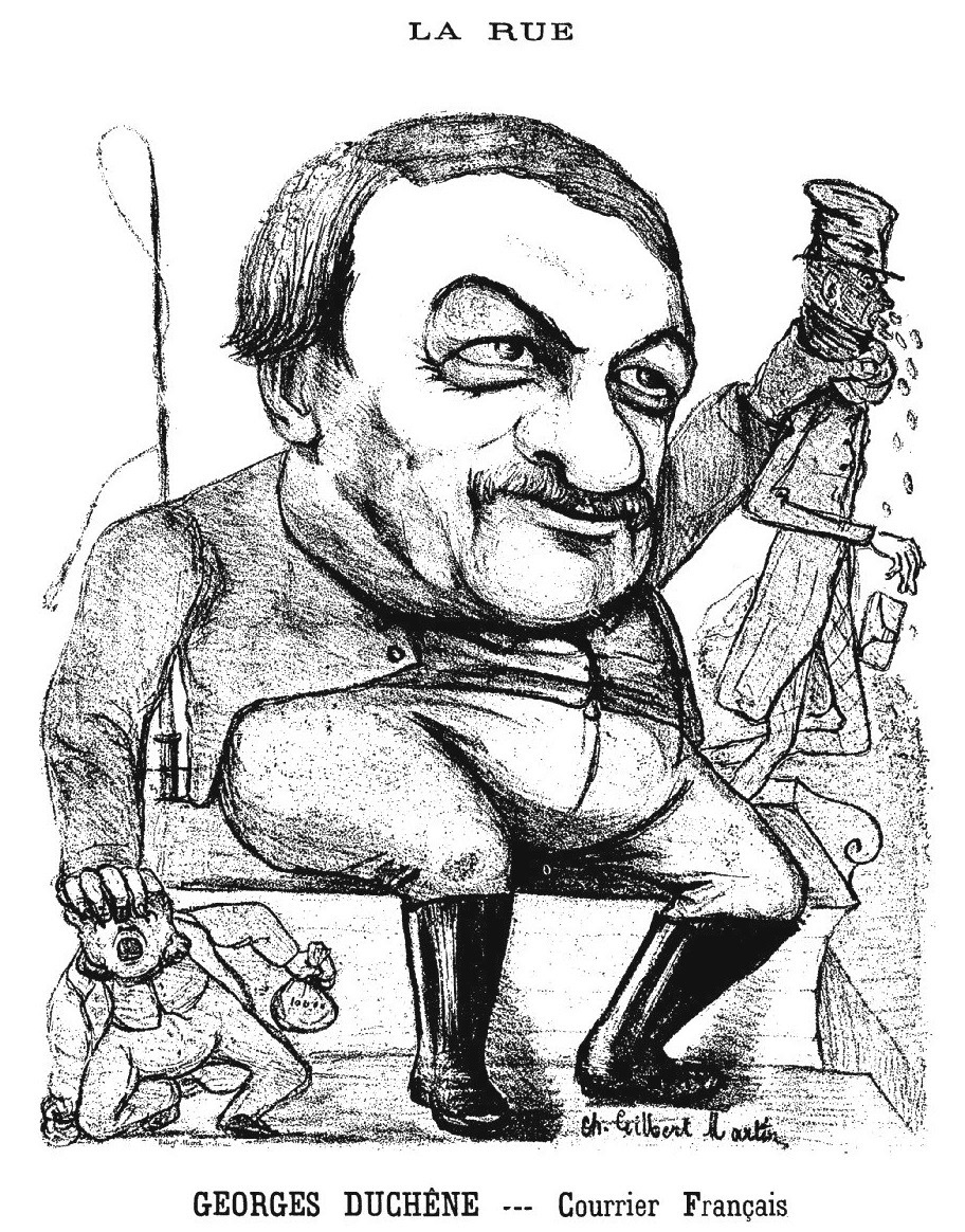 Georges Duchêne. Courrier français